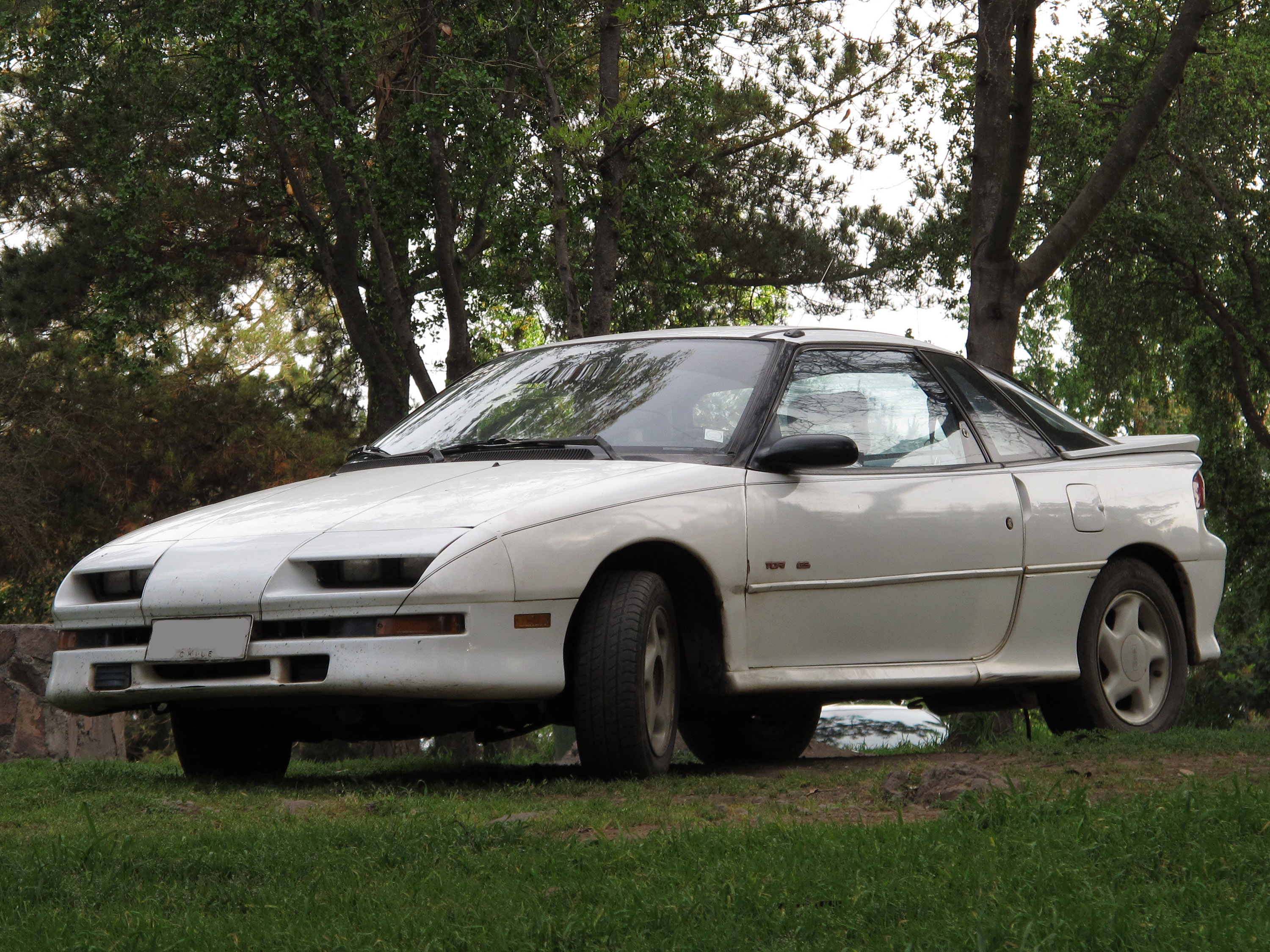 Geo Storm 1.6 GSi 1991